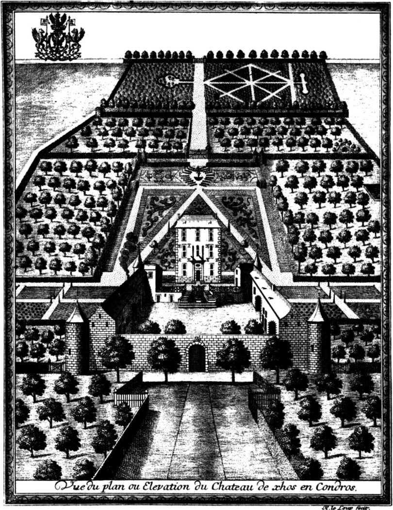 Stich mit der Abbildung des Schlosses Xhos, Belgien